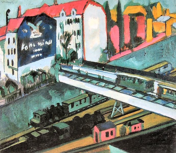 Ernst Ludwig Kirchner: Straßenbahn und Eisenbahn, 1914, Öl auf Leinwand, 71 x 81 cm, Museum für Kunst und Kulturgeschichte der Hansestadt Lübeck